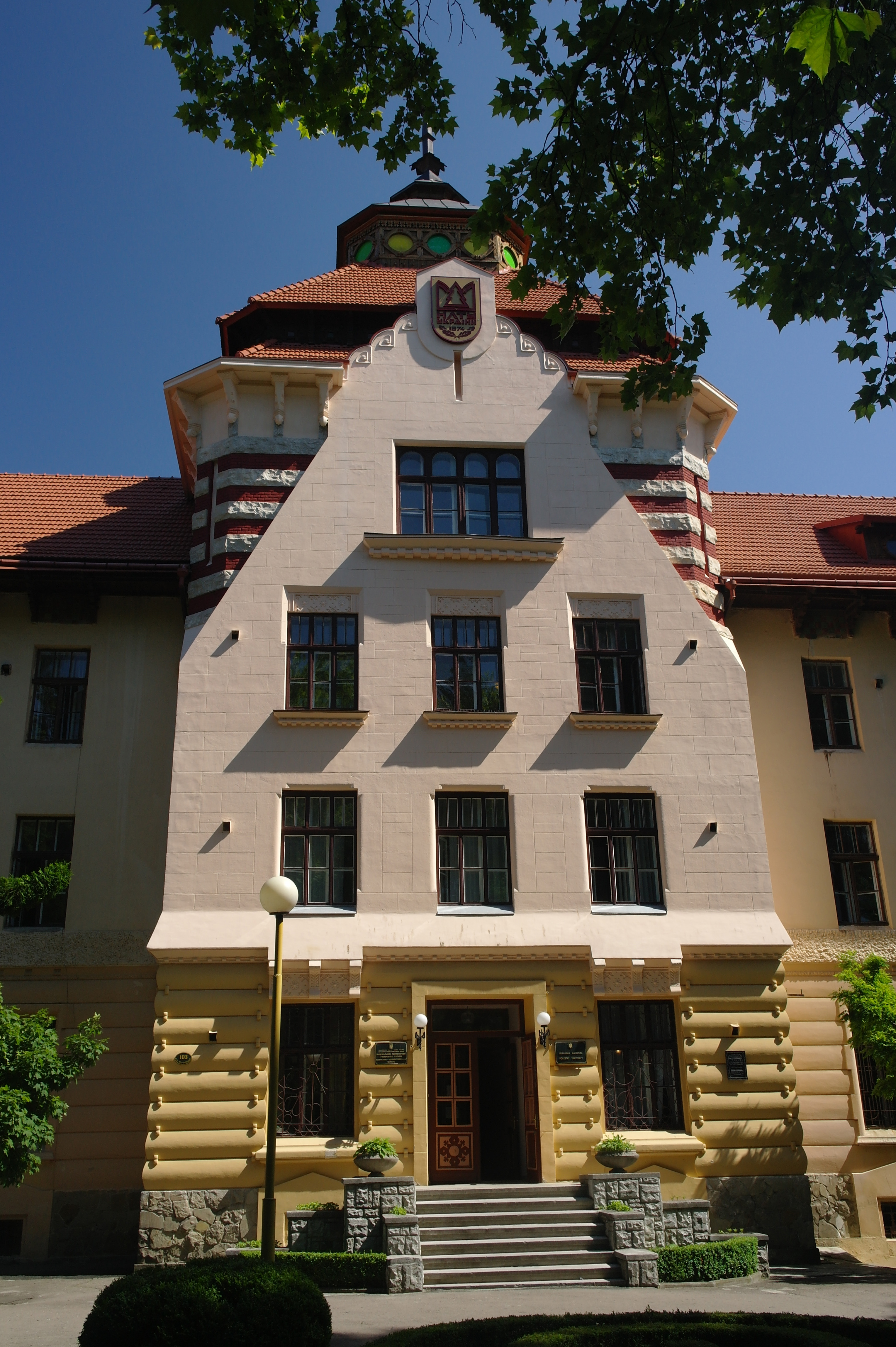 Львів, генерала Чупринки, 103, ризаліт головного корпусу Національного лісотехнічного університету